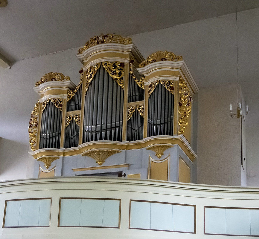 Silbermann-Orgel von 1732 in der evangelisch-lutherischen Kirche im sächsischen Crostau